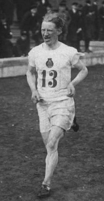 Josef Ternström